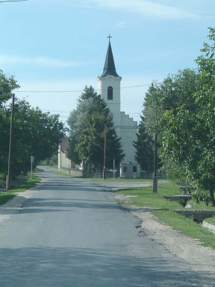 The church of Jásd, Hungary. Szűz Mária a Világ Királynéja római katolikus templom